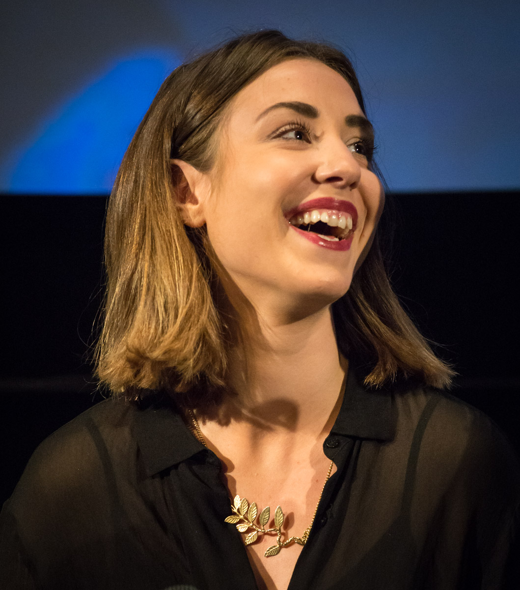 Madeleine Martin under presentationen av den Svenska filmhösten i Filmhuset i Stockholm den 17 augusti 2015.